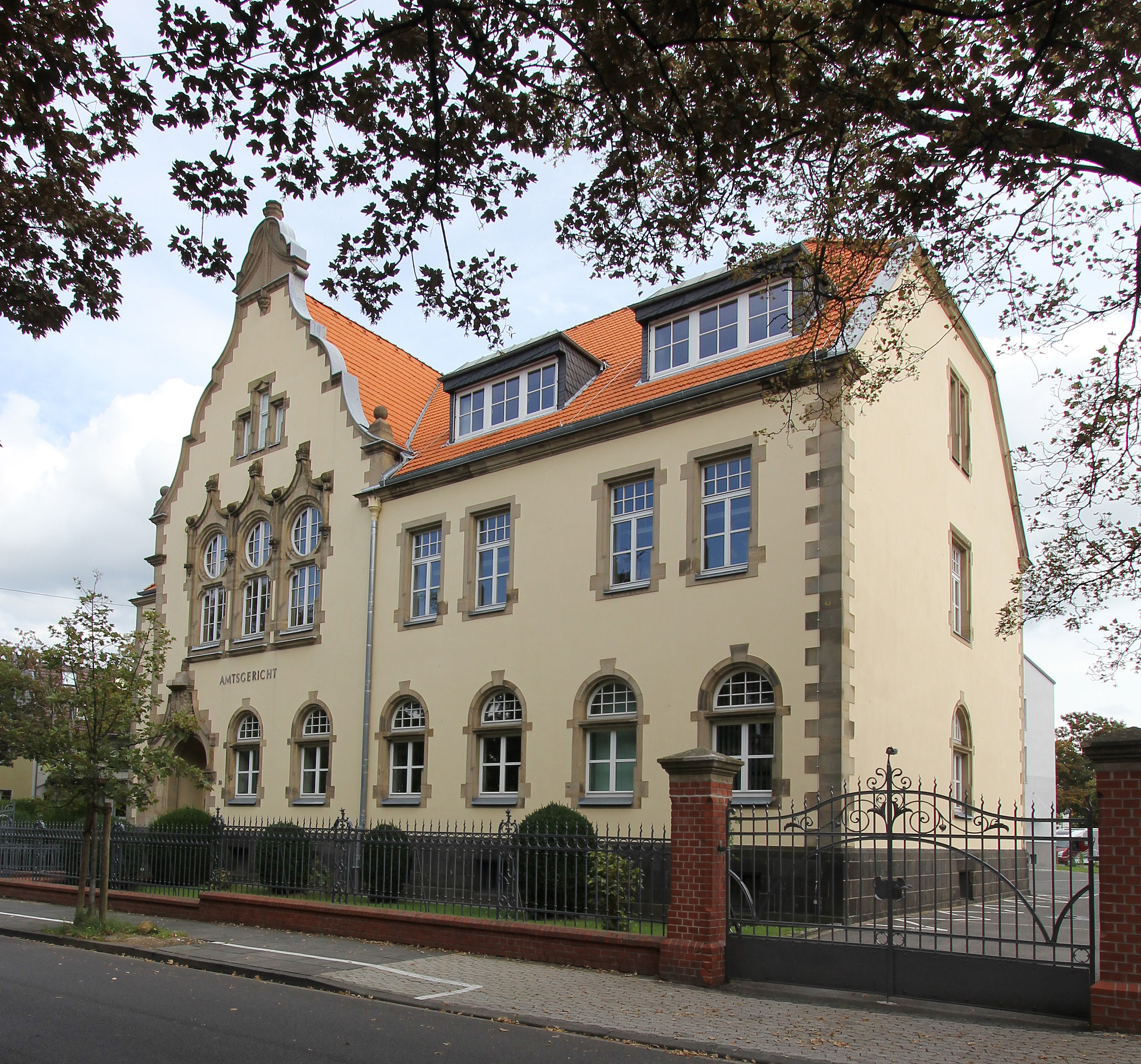 Rheinbach, Schweigelstraße 30, Amtsgericht.